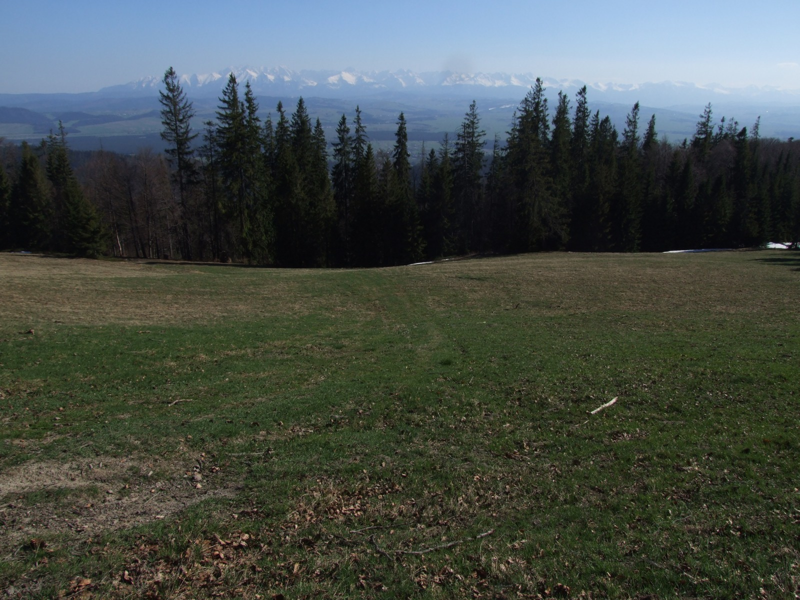 Polana Wysznia w Gorcach. Widok na Tatry